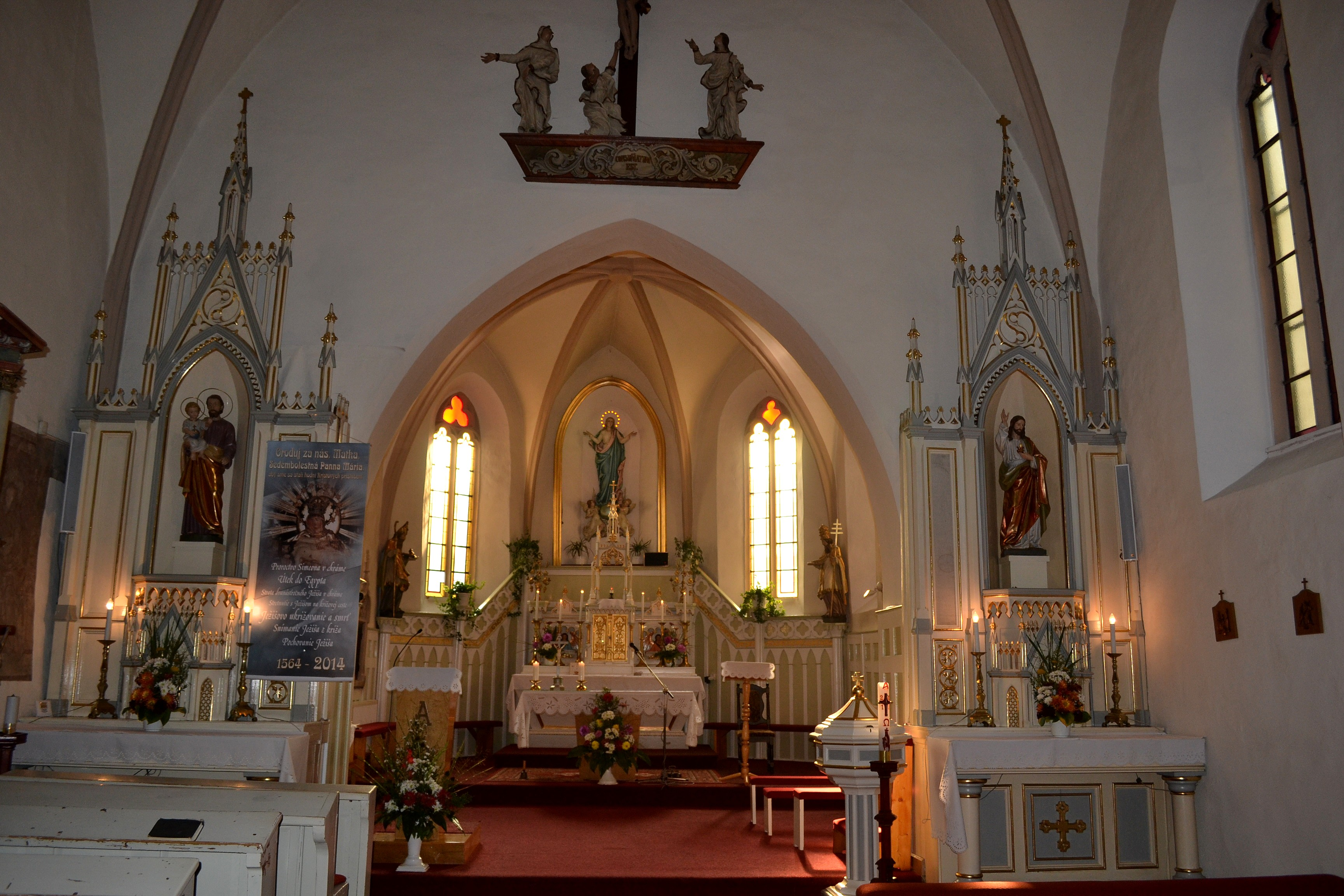 Pohľad do interiéru kostola